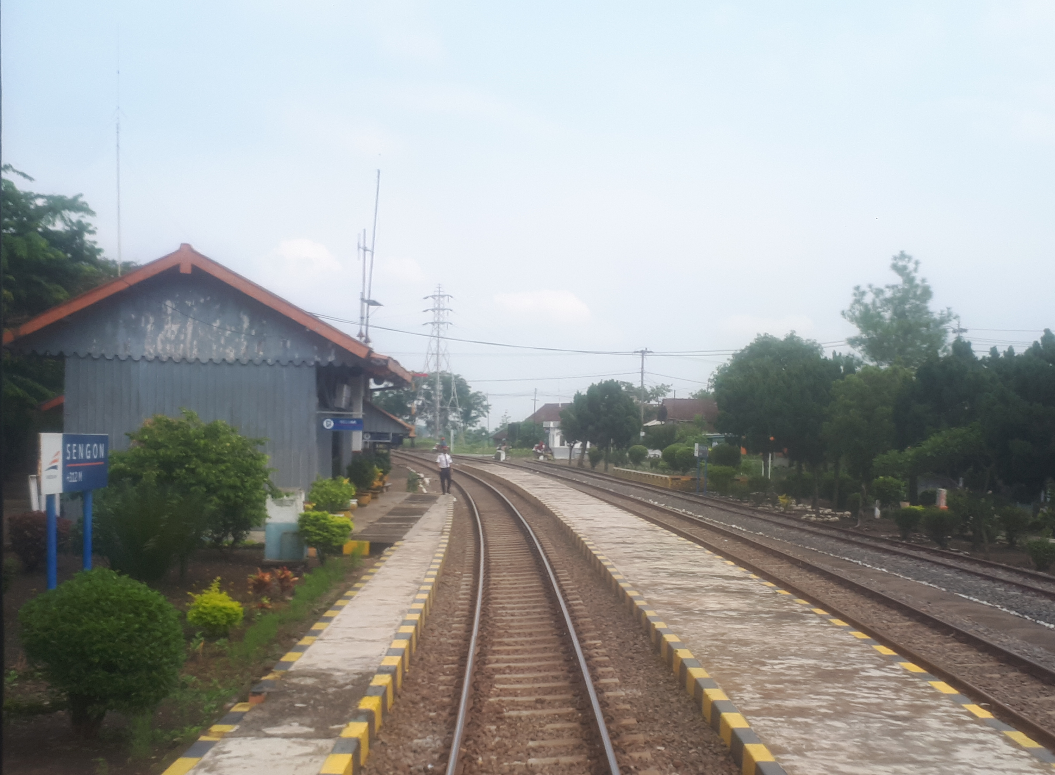 Emplasemen Stasiun Sengon pada tahun 2020